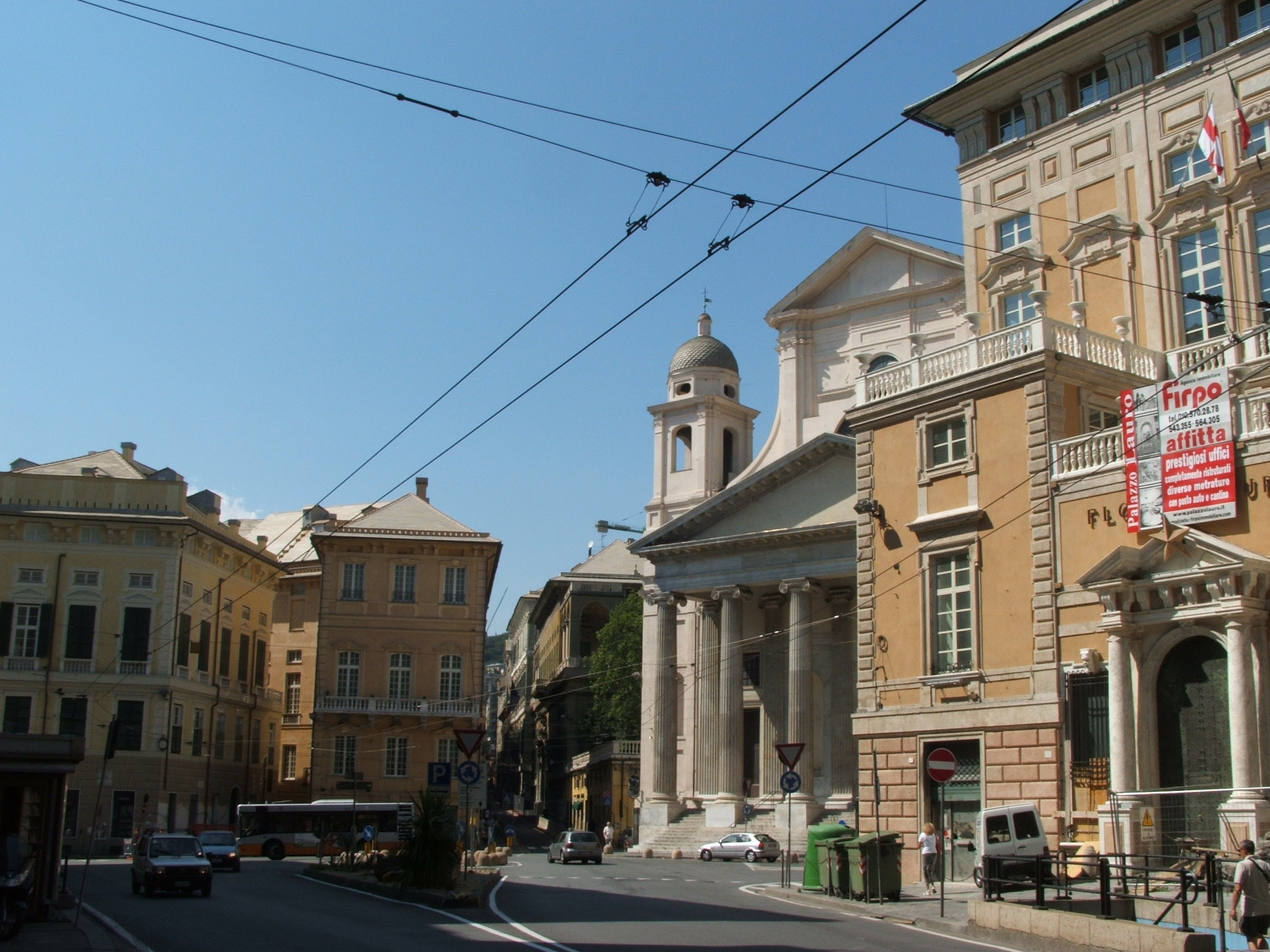 Piazza dell'Annunziata a Genova